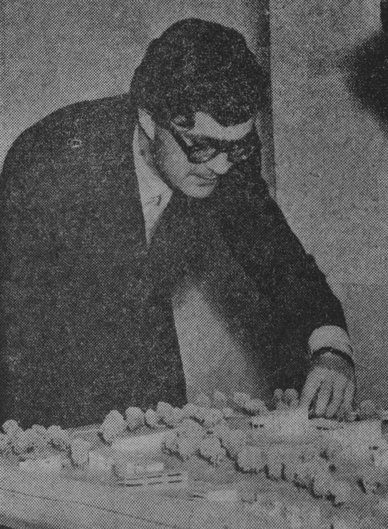 Jaan Allpere med modell av "Statligt seminarium på Lidingö"